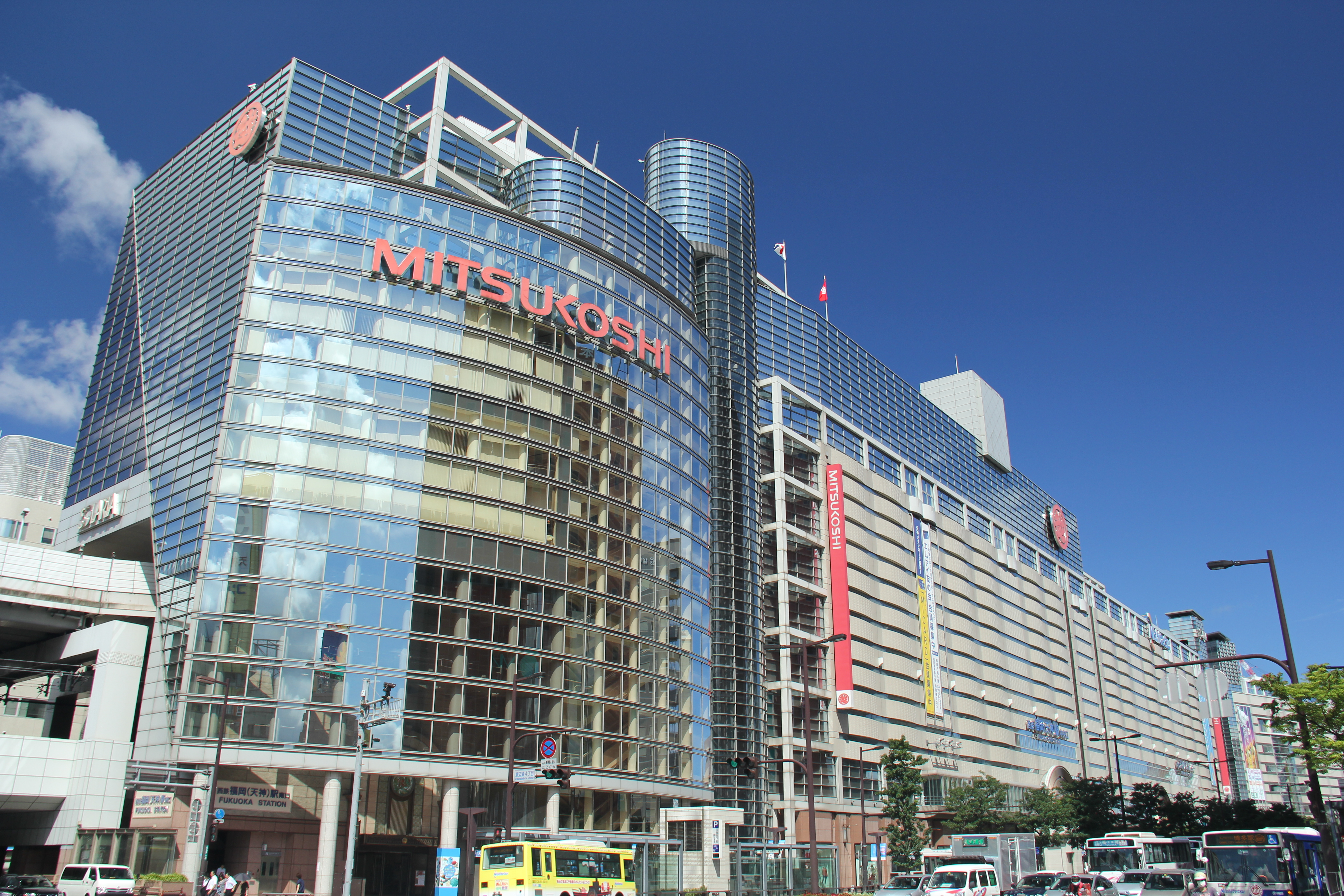 渡辺通り側から見たソラリアターミナルビル Canon EOS 60D